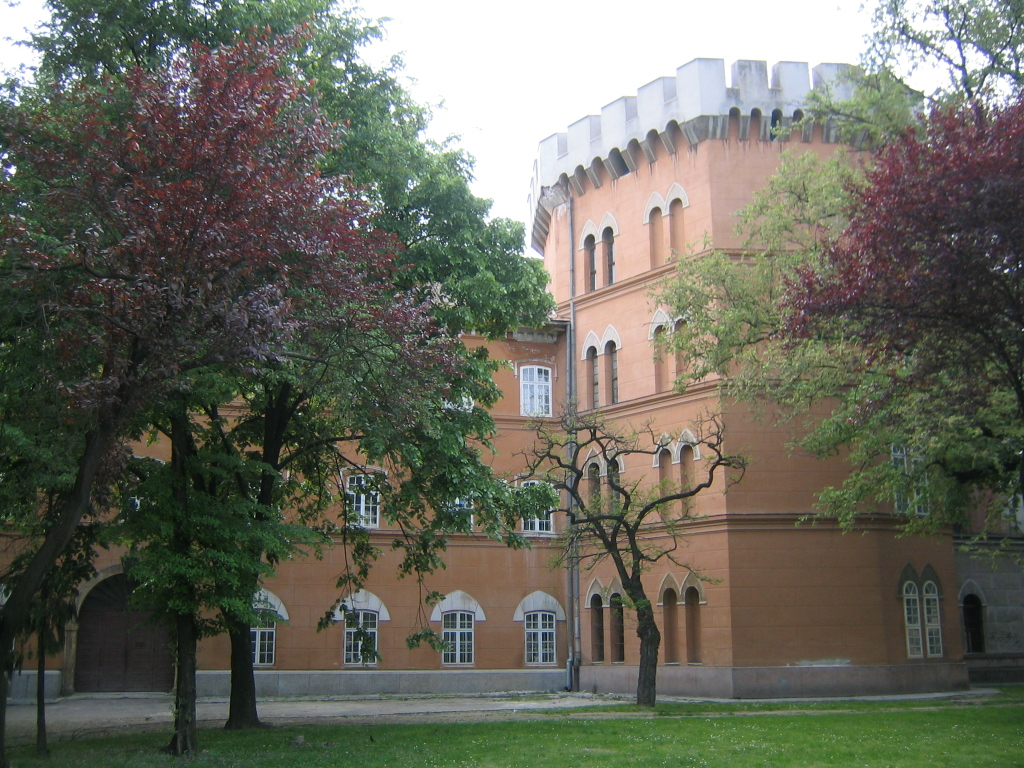 Château de Huniade à Timişoara.